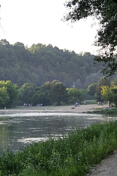 Valakupiai II Beach in Antakalnis elderate, Vilnius